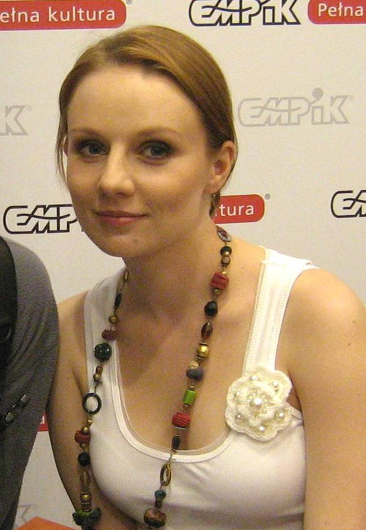 Ewelina Flinta (ur. 24 października 1979 roku w Lubsku) - polska wokalistka pop-rockowa